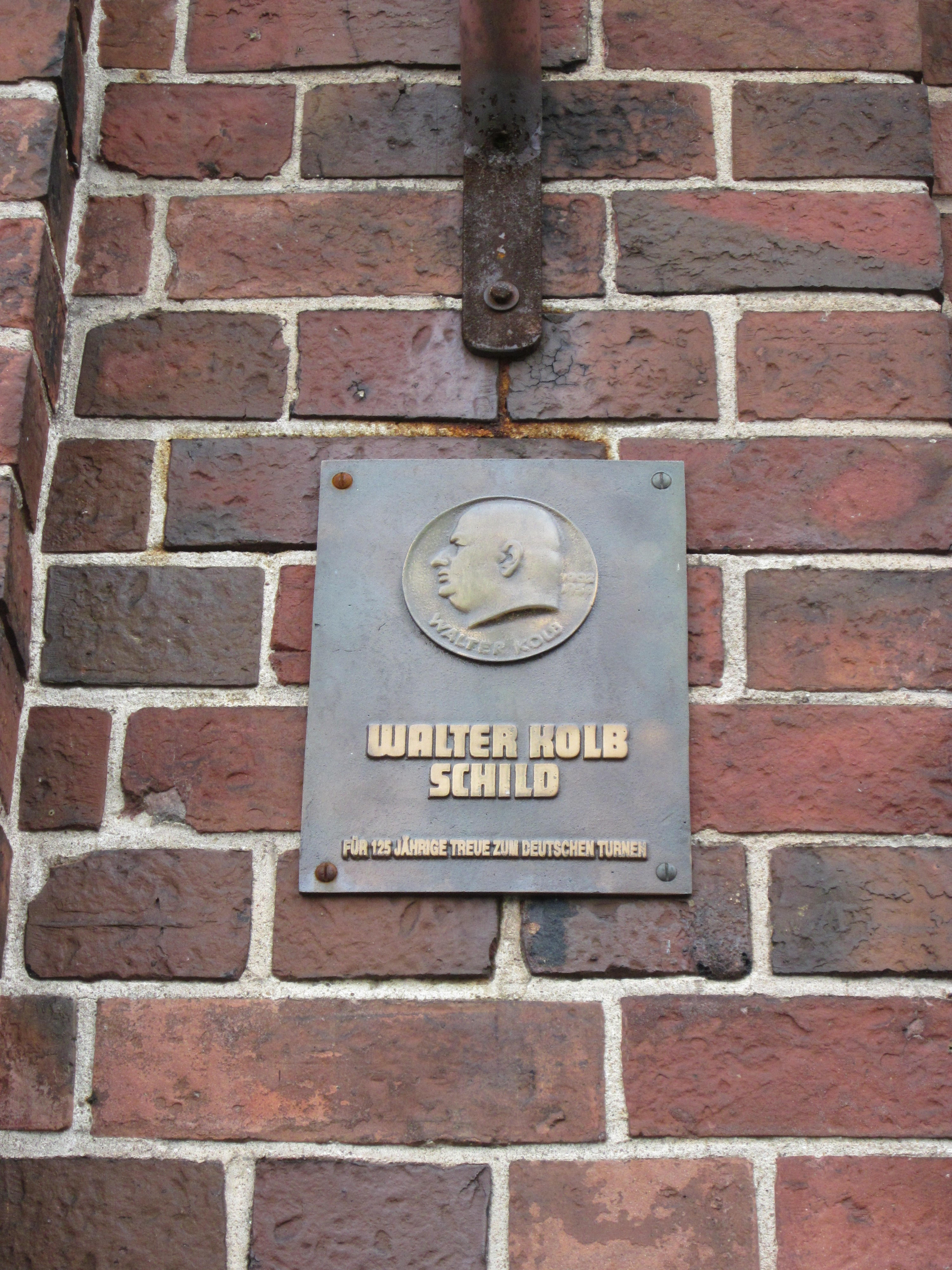 "Walter-Kolb-Schild" des Deutschen Turner-Bundes am Eingang der Ernst-Moritz-Arndt-Halle in der Ritterstraße in Eilbek. Dieses Schild wird vom Deutschen Turner-Bund aus Anlaß des 125-jährigen Bestehens von Turnvereinen verliehen.